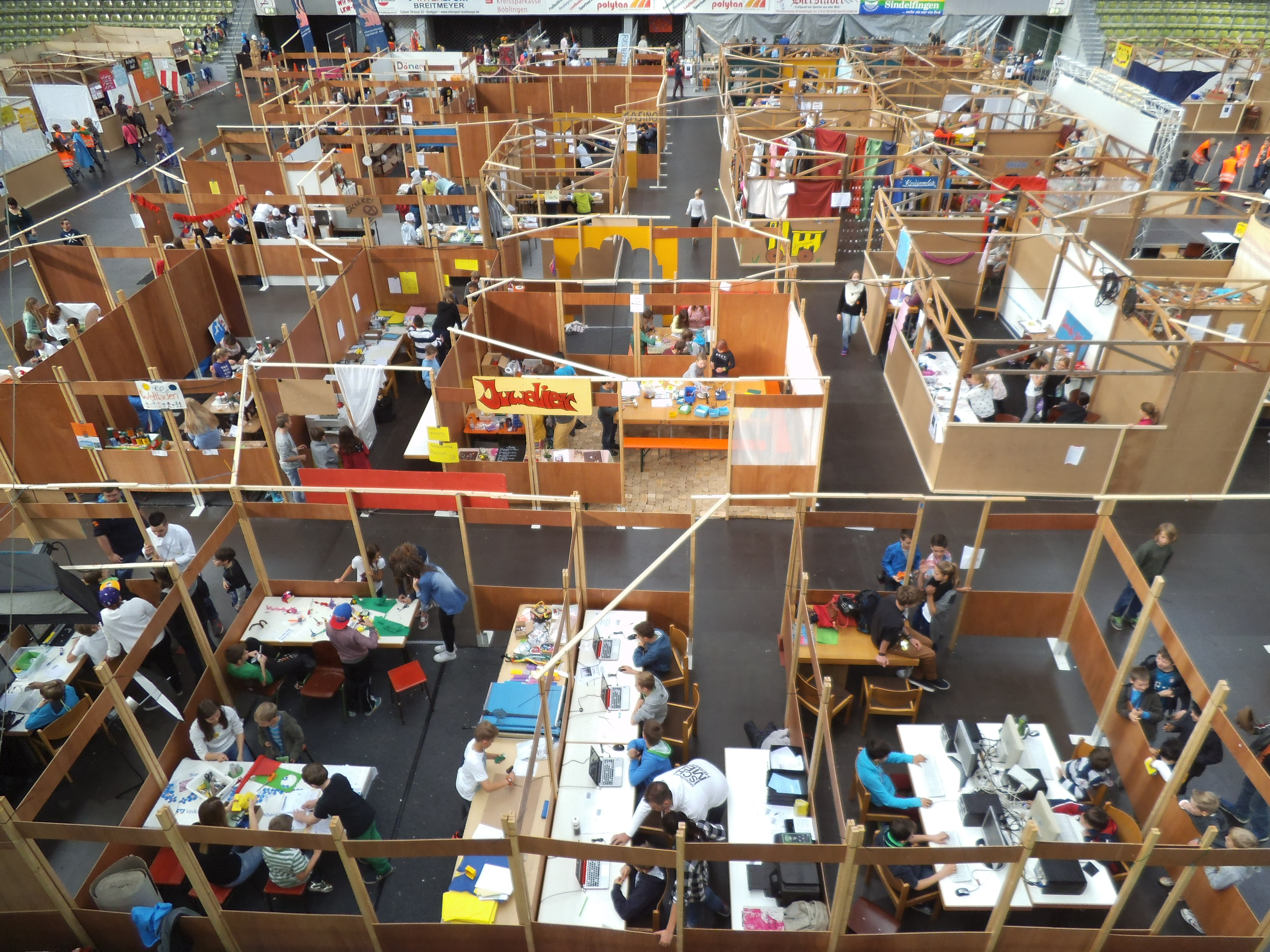 Kinderspielstadt Simsalon 2014